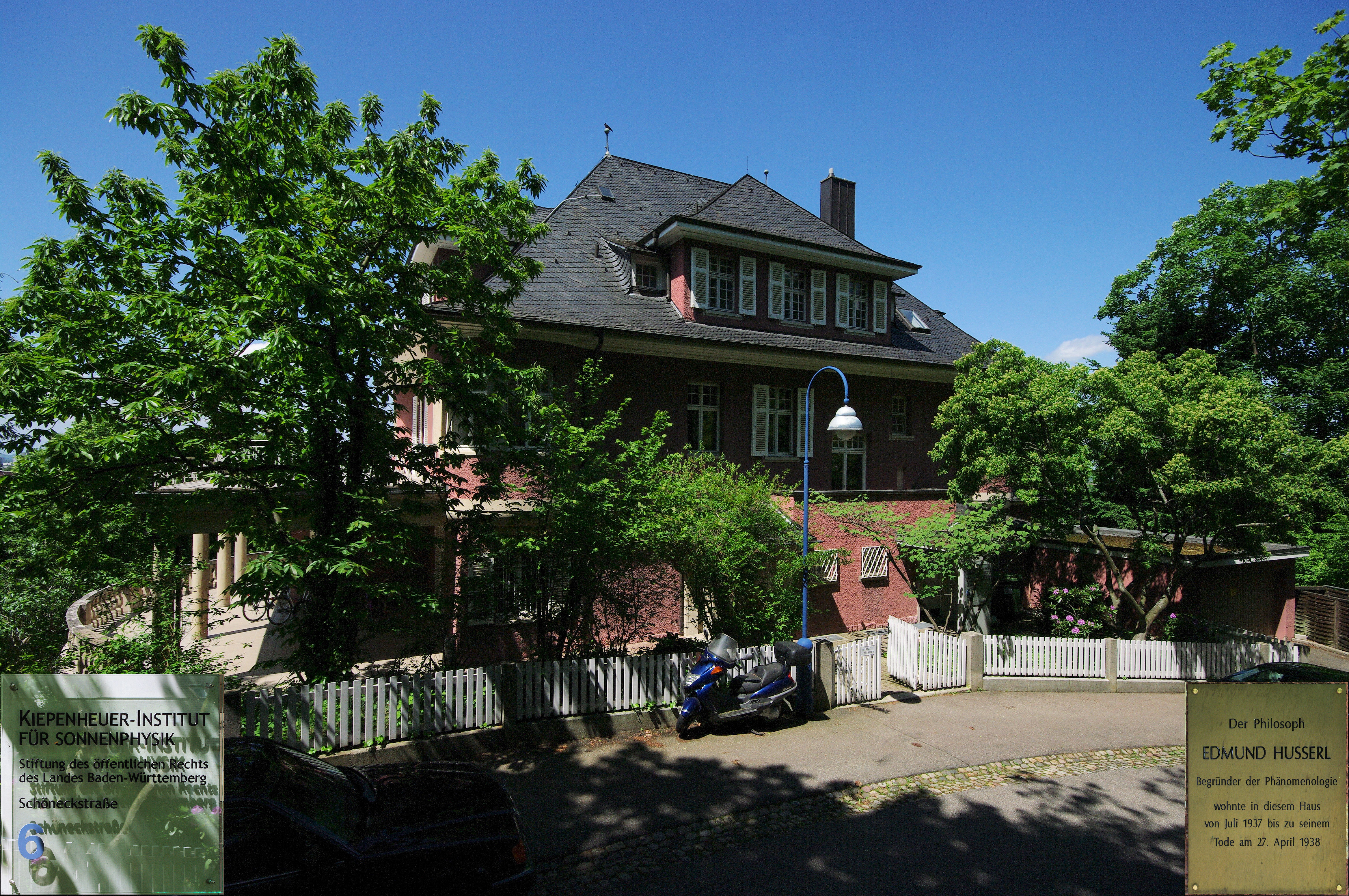 Kiepenheuer Institut für Sonnenphysik, Schöneckstraße 6. Freiburg im Breisgau In diesem Haus lebte auch der Philosoph und Begründer der Phänomenologie Edmund Husserl